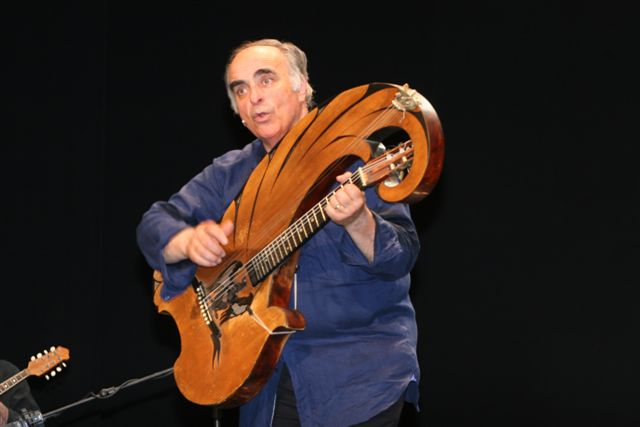 Riccardo Marasco during a show in Campi Bisenzio, Teatro Dante